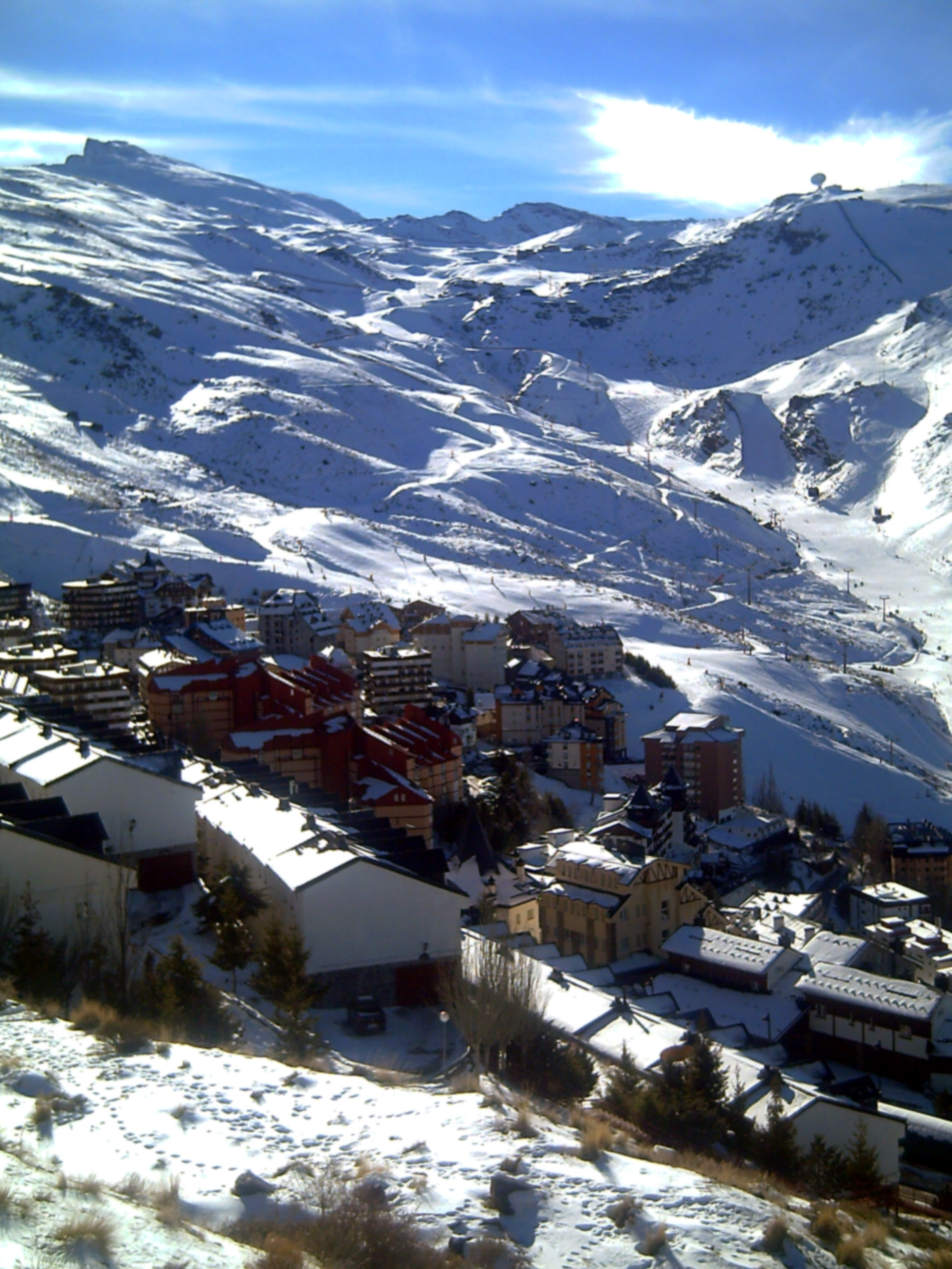 Pradollano resort in Sierra Nevada (Spain)